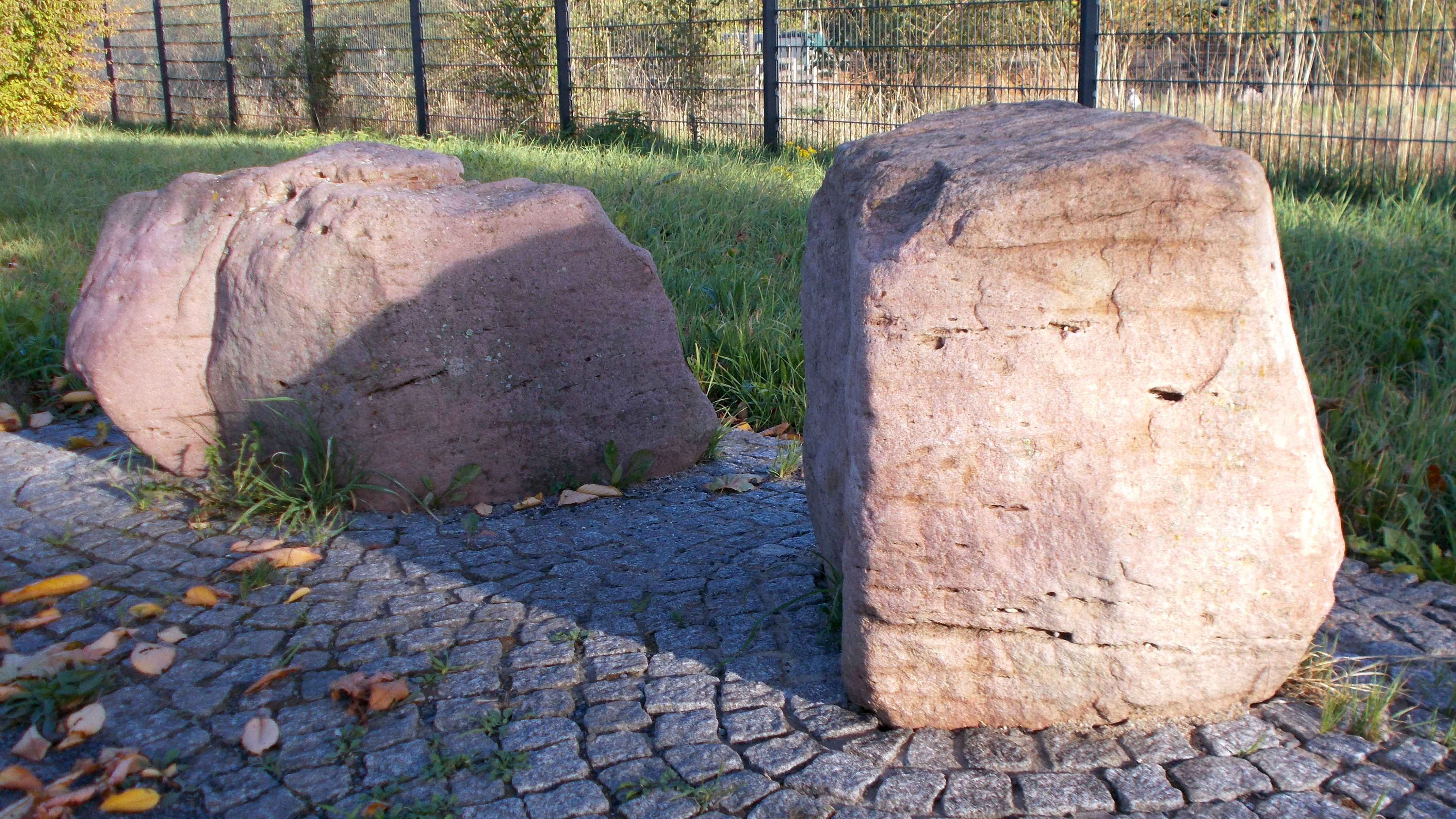 Findlingsweg Sonsbeck Station 5: Buntsandstein